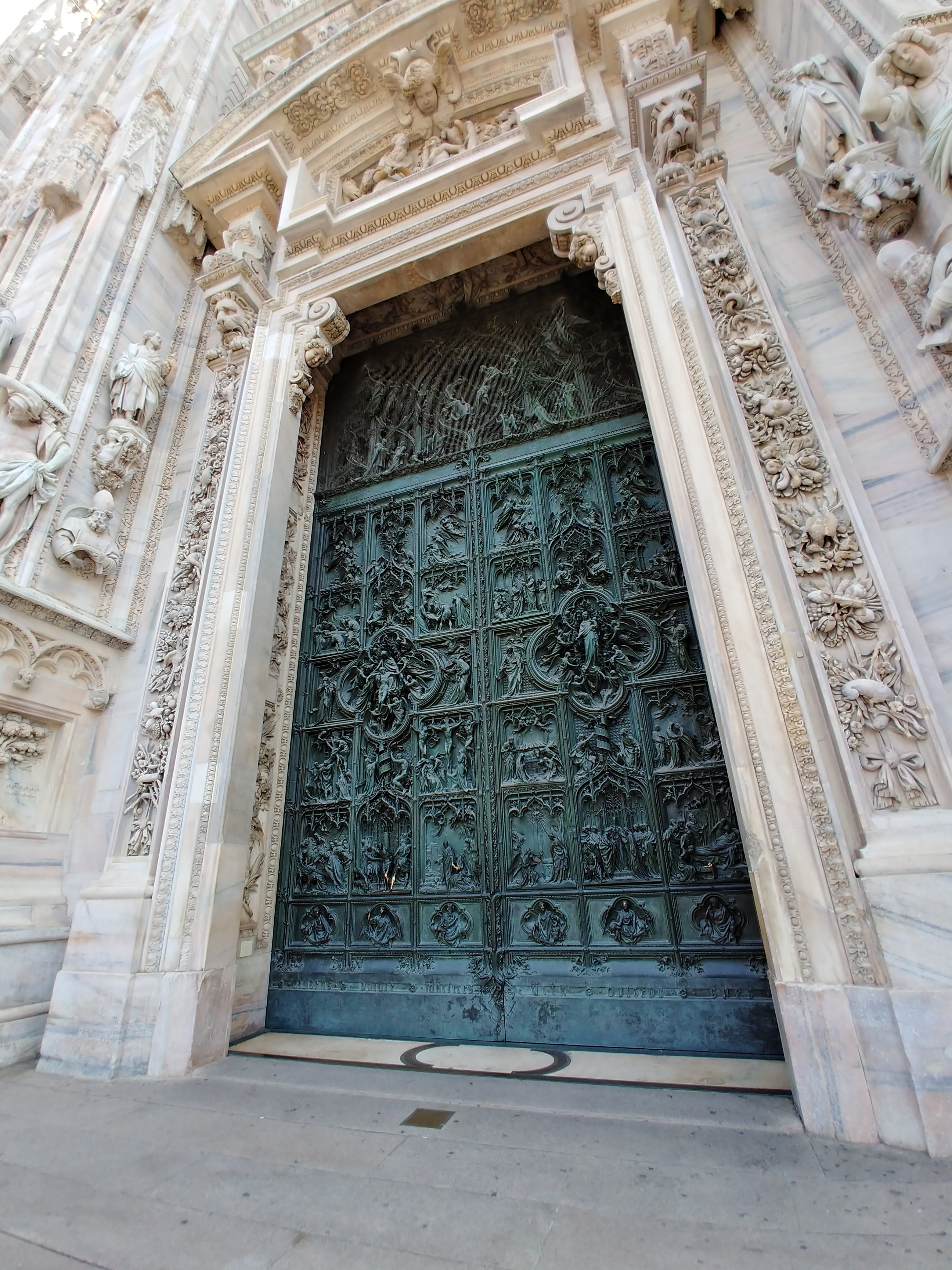 Hauptportal des Doms zu Mailand (ohne Personen)